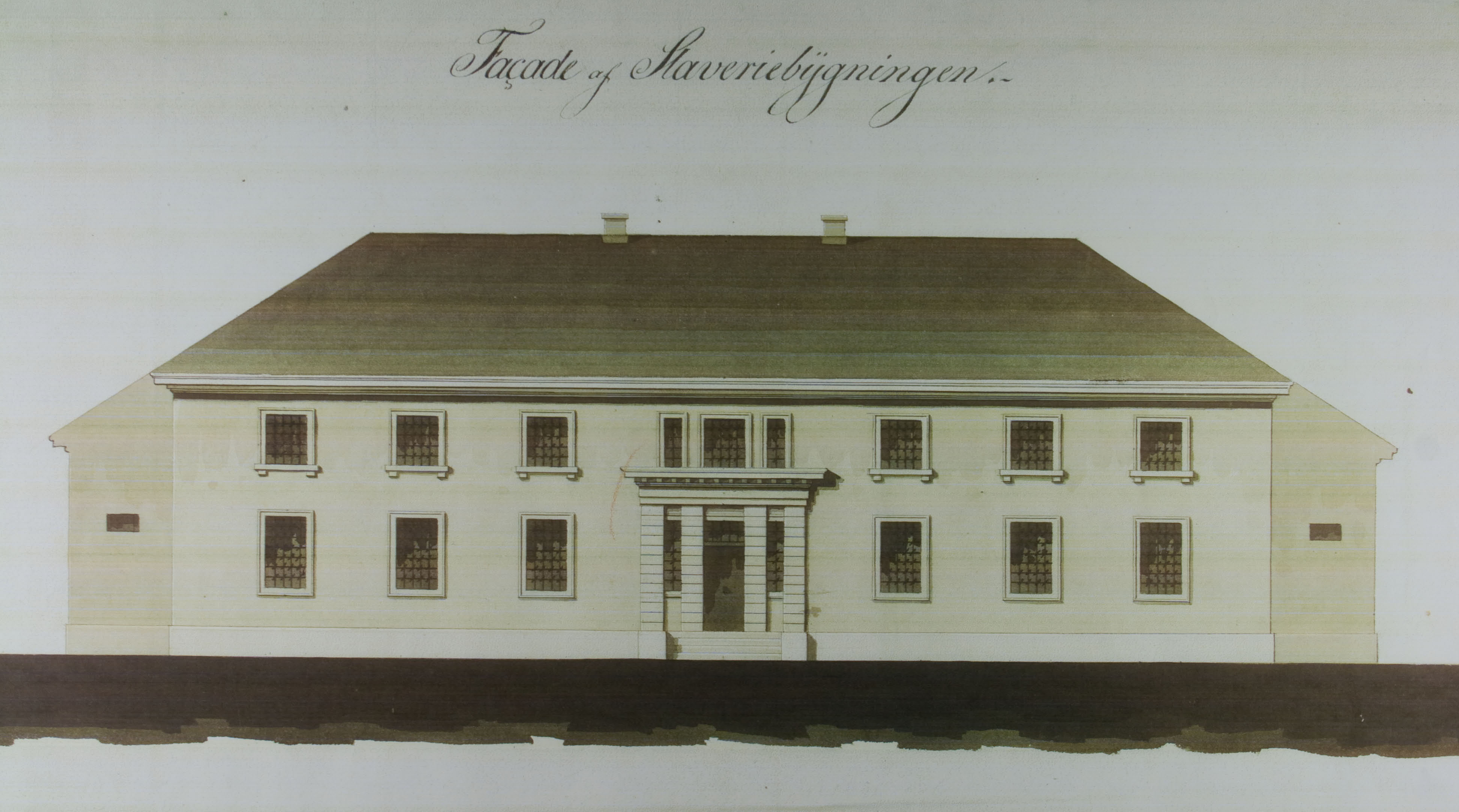 Tegning av slaveriets fasade. Arkitekten er Ole Petter Riis Høegh